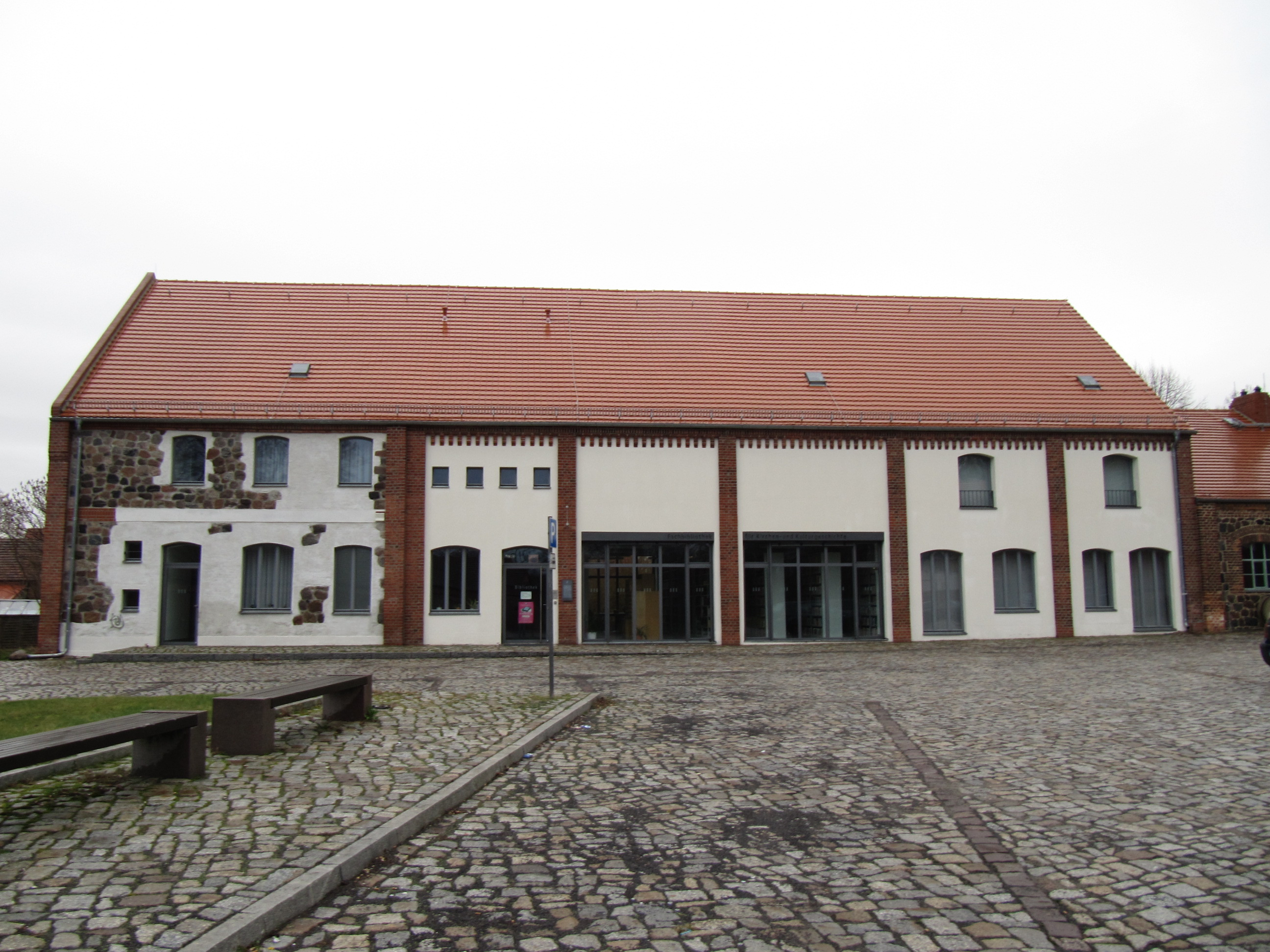 Gebäude Fachbibliothek für Kirchen- und Kulturgeschichte im unteren Burghof der Burg Ziesar